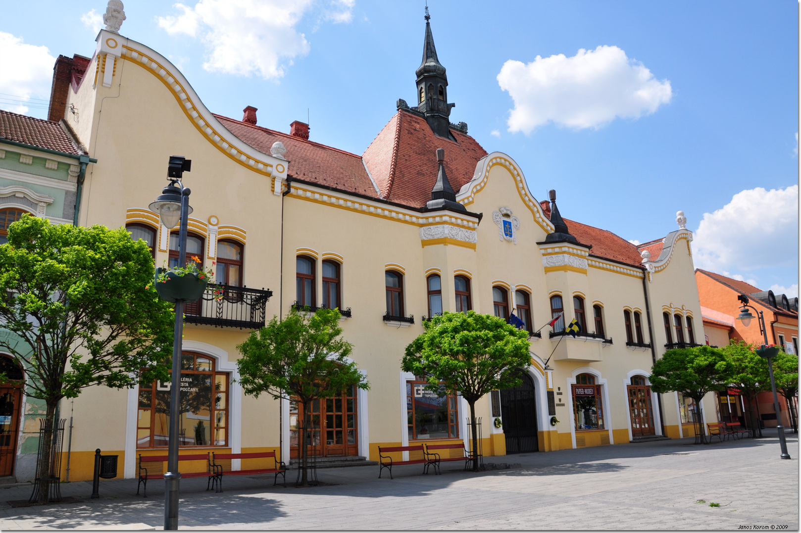 Topoľčany